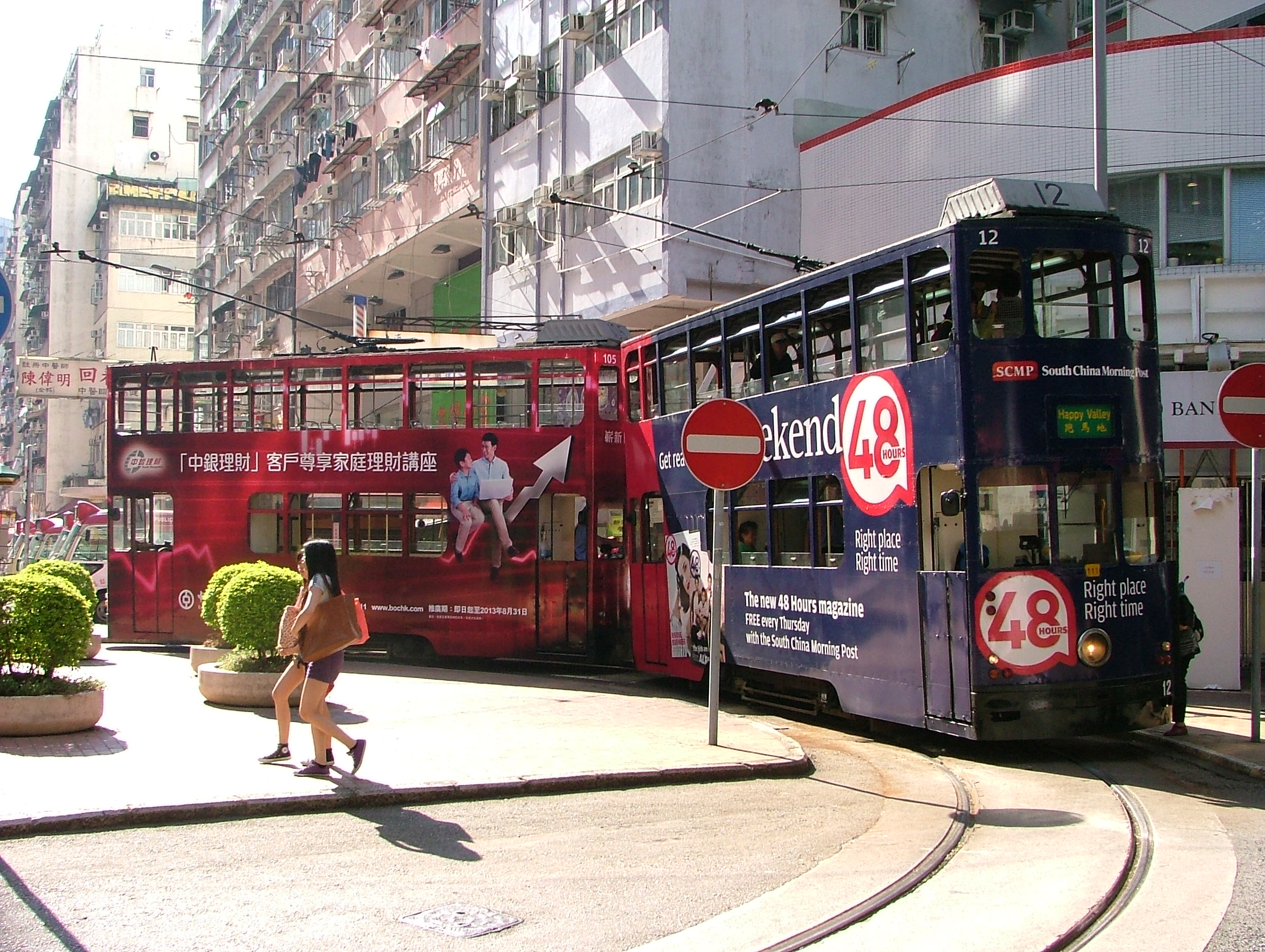 Wikimania HongKong